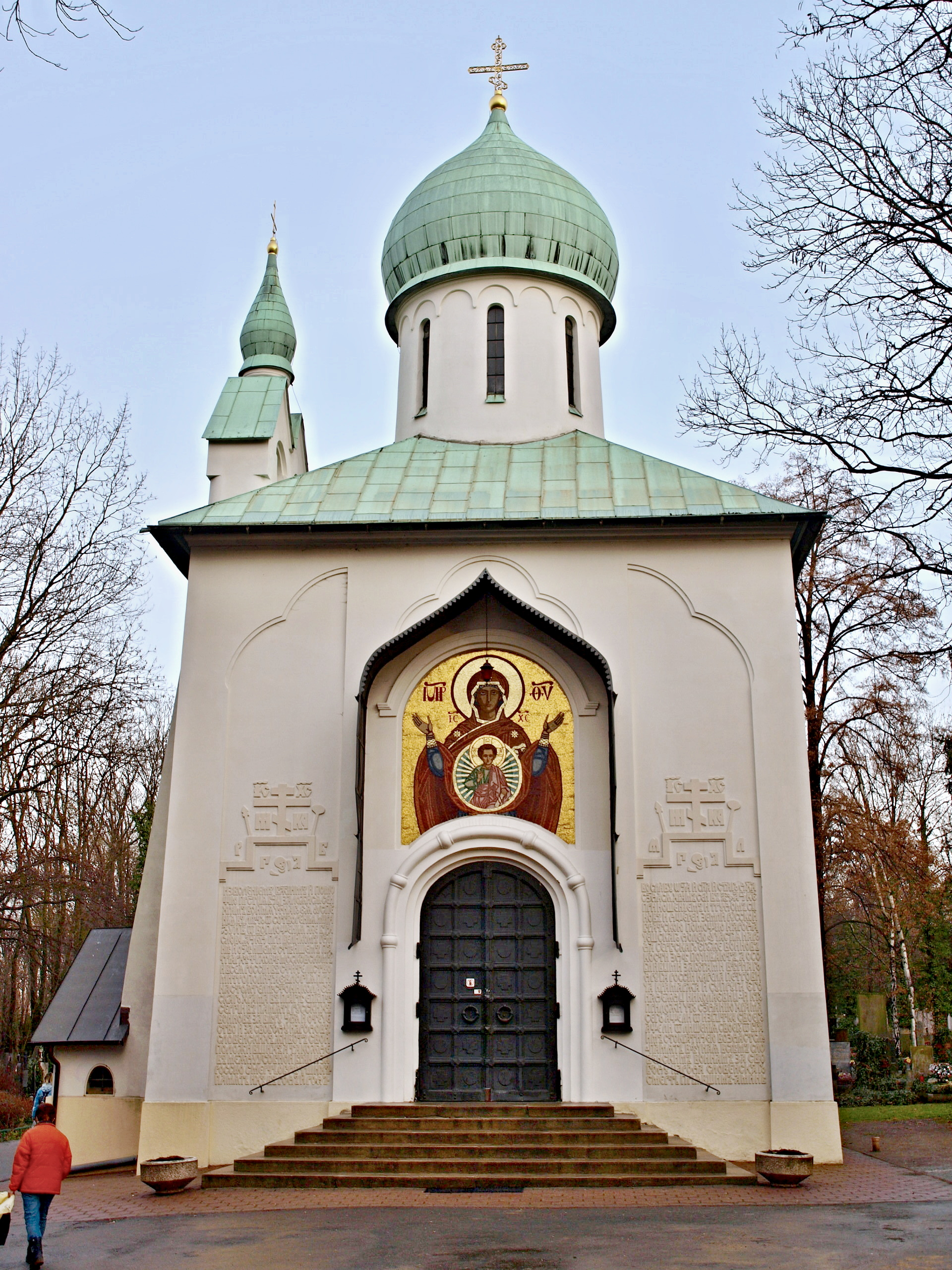 Chrám Zesnutí přesvaté Bohorodice, Olšany, Praha